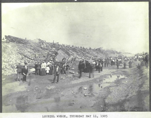 Bei dem Eisenbahnunfall von Harrisburg am 11. Mai 1905 in Harrisburg, Pennsylvania, USA explodierte auf einer Strecke der Pennsylvania Railroad nach einer Entgleisung Gefahrgut, wodurch 23 Menschen starben Histotische Presseaufnahmen